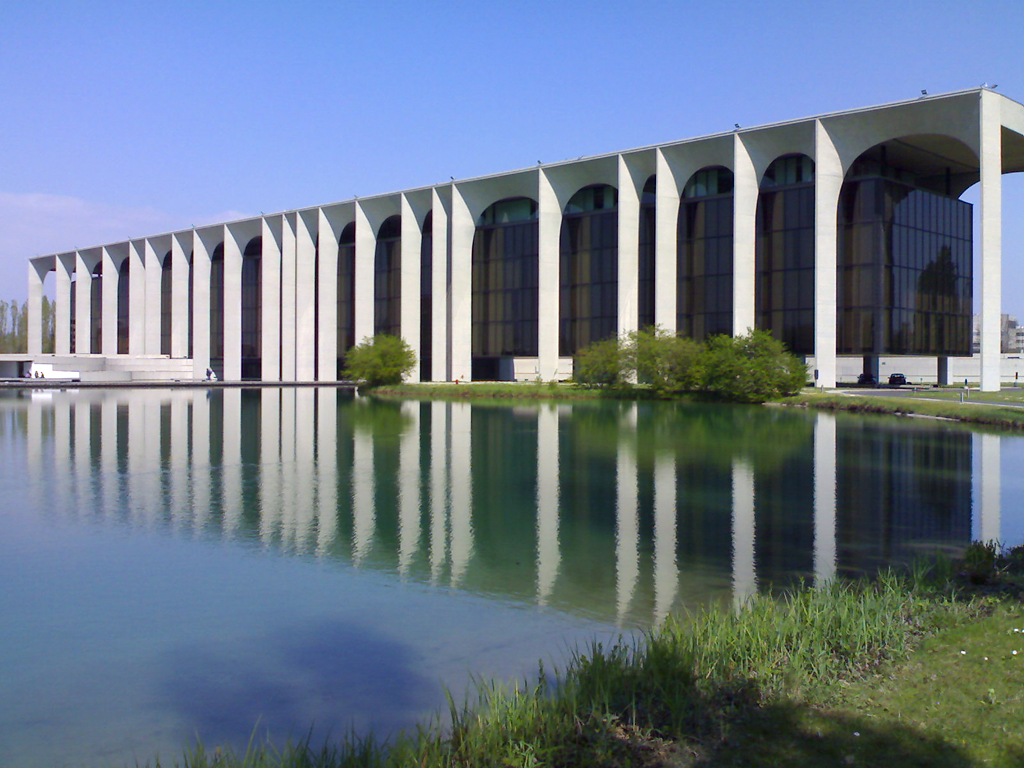 Segrate, sede della società Arnoldo Mondadori Editore. Fu costruita dal 1968 al 1974 su progetto di Oscar Niemeyer, con la collaborazione di Luciano Pozzo e Glauco Campello. Fonte: Maurizio Grandi e Attilio Pracchi, Milano. Guida all’architettura moderna, Bologna, Zanichelli [1980], 1998, p. 380, ISBN 88-08-05210-9.